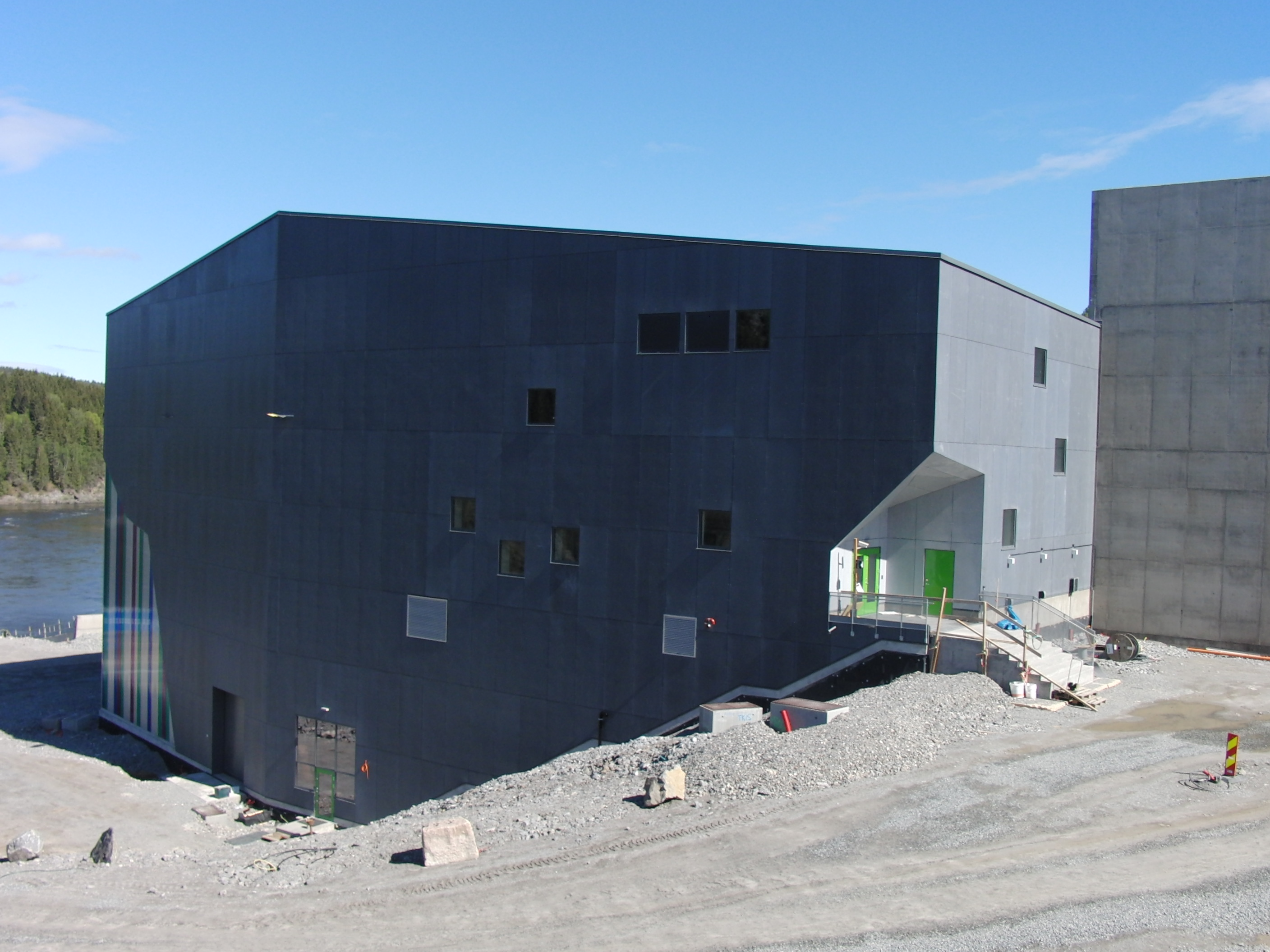 Vamma 12 - nettopp startet opp